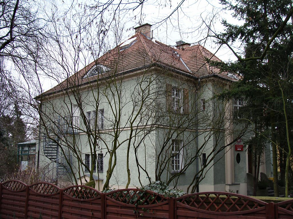 Szczecin, Aleja Wojska Polskiego 211 - willa z ogrodem (zabytek nr 288)